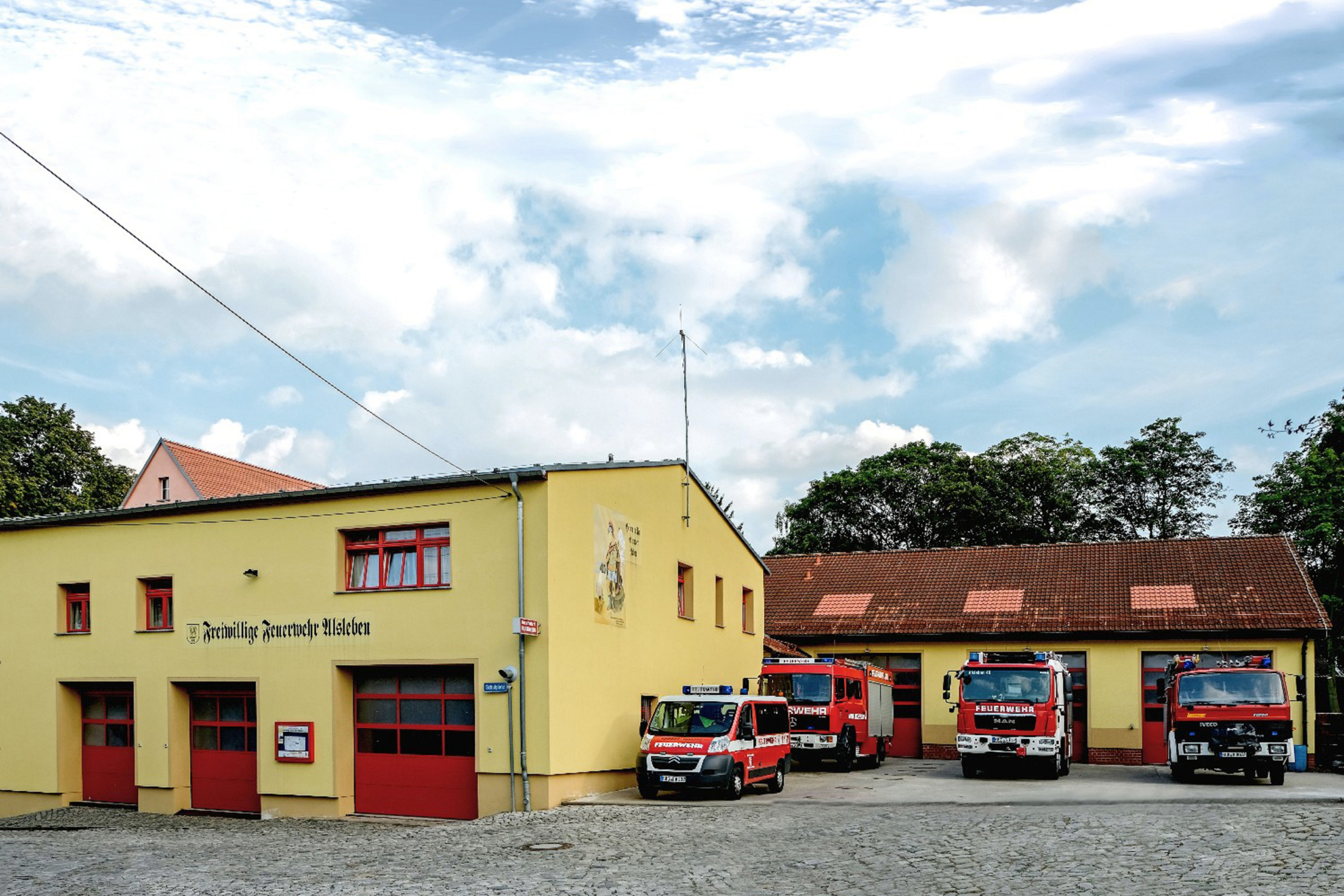 Das Feuerwehrgebäude von Alsleben mit Fuhrpark.